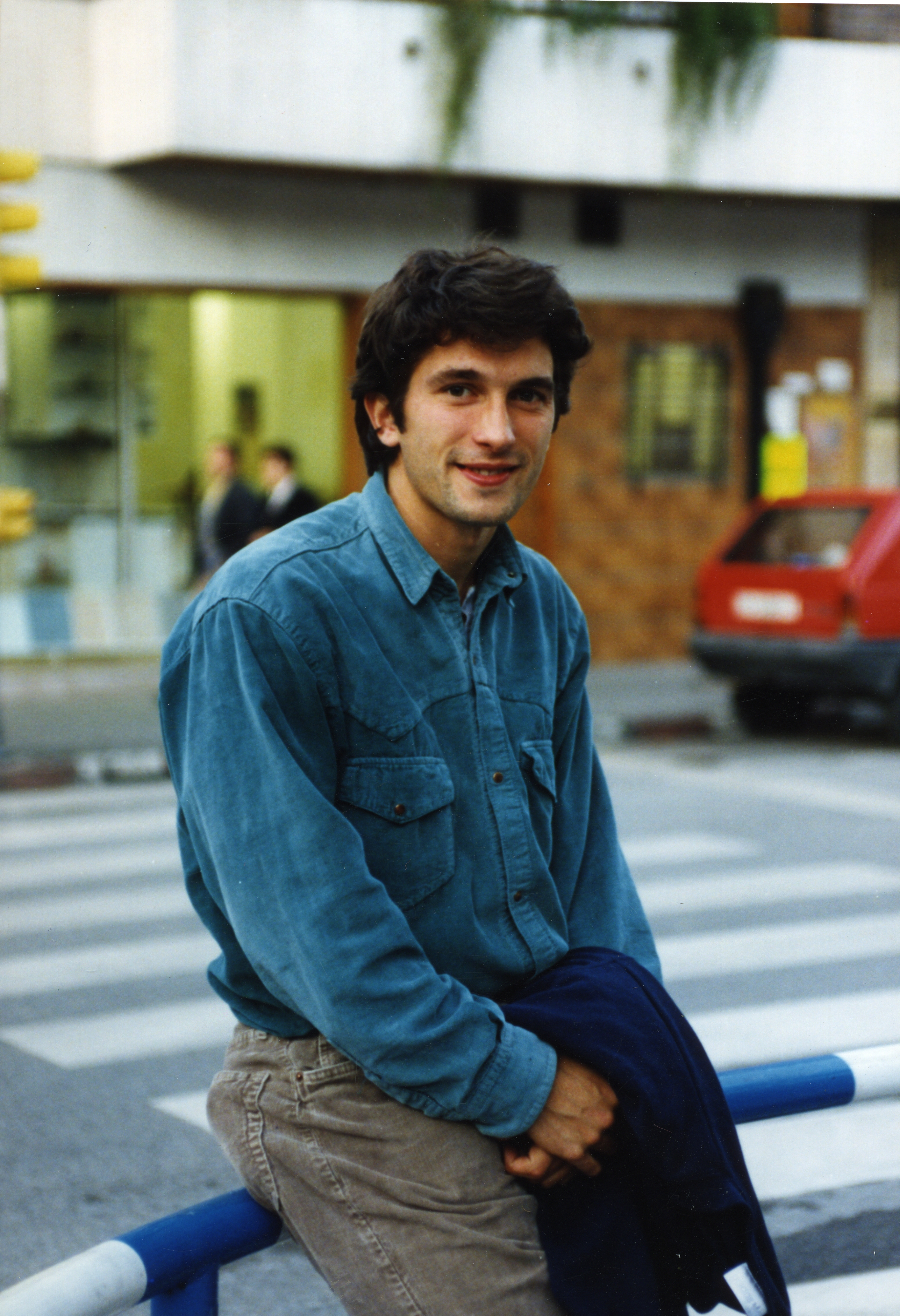 Andoni Imaz. Aiurri 7 zbk. 28. orr.